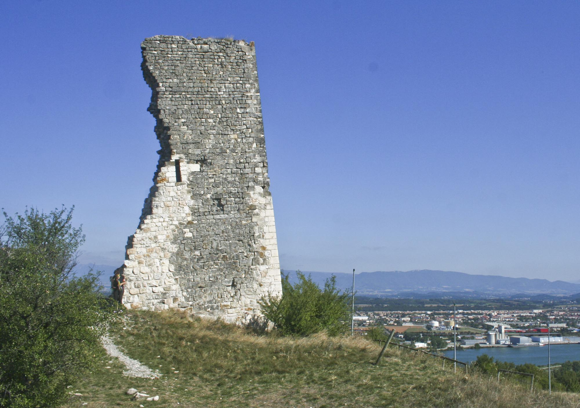 Soyons, Ardèche, France : la tour penchée